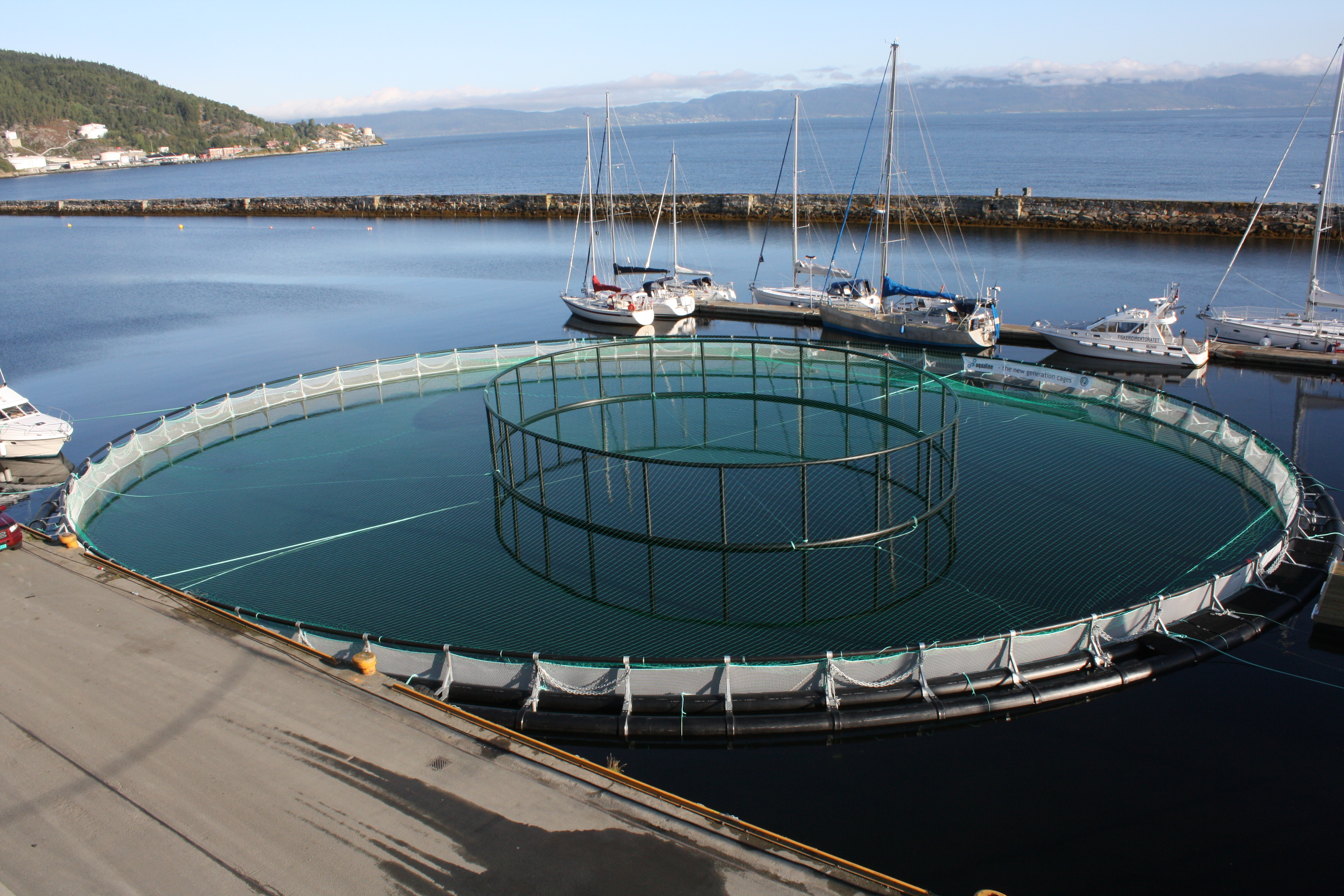 Merd